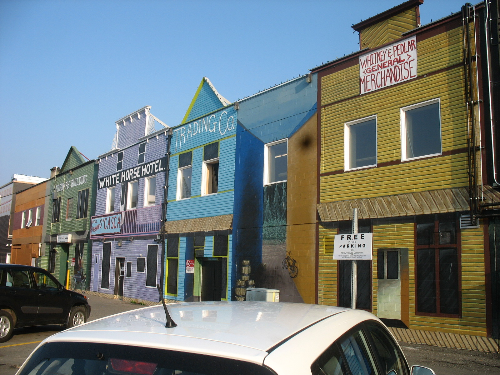 Trompe l'oeils dans les rues de WhiteHorse (YT)